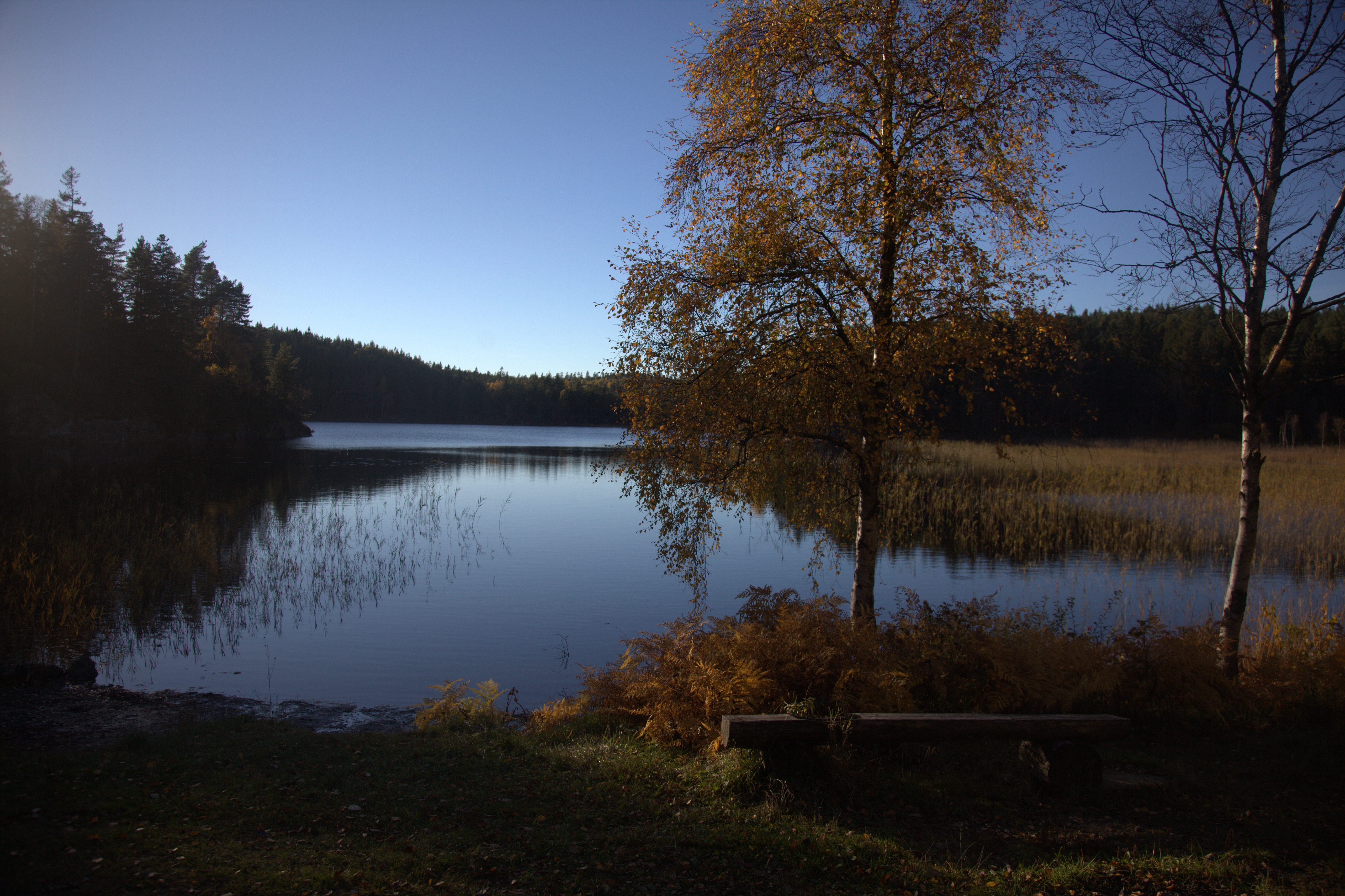 Stora Äggdalssjön i Kungälvs kommun. Foto taget på östra stranden.